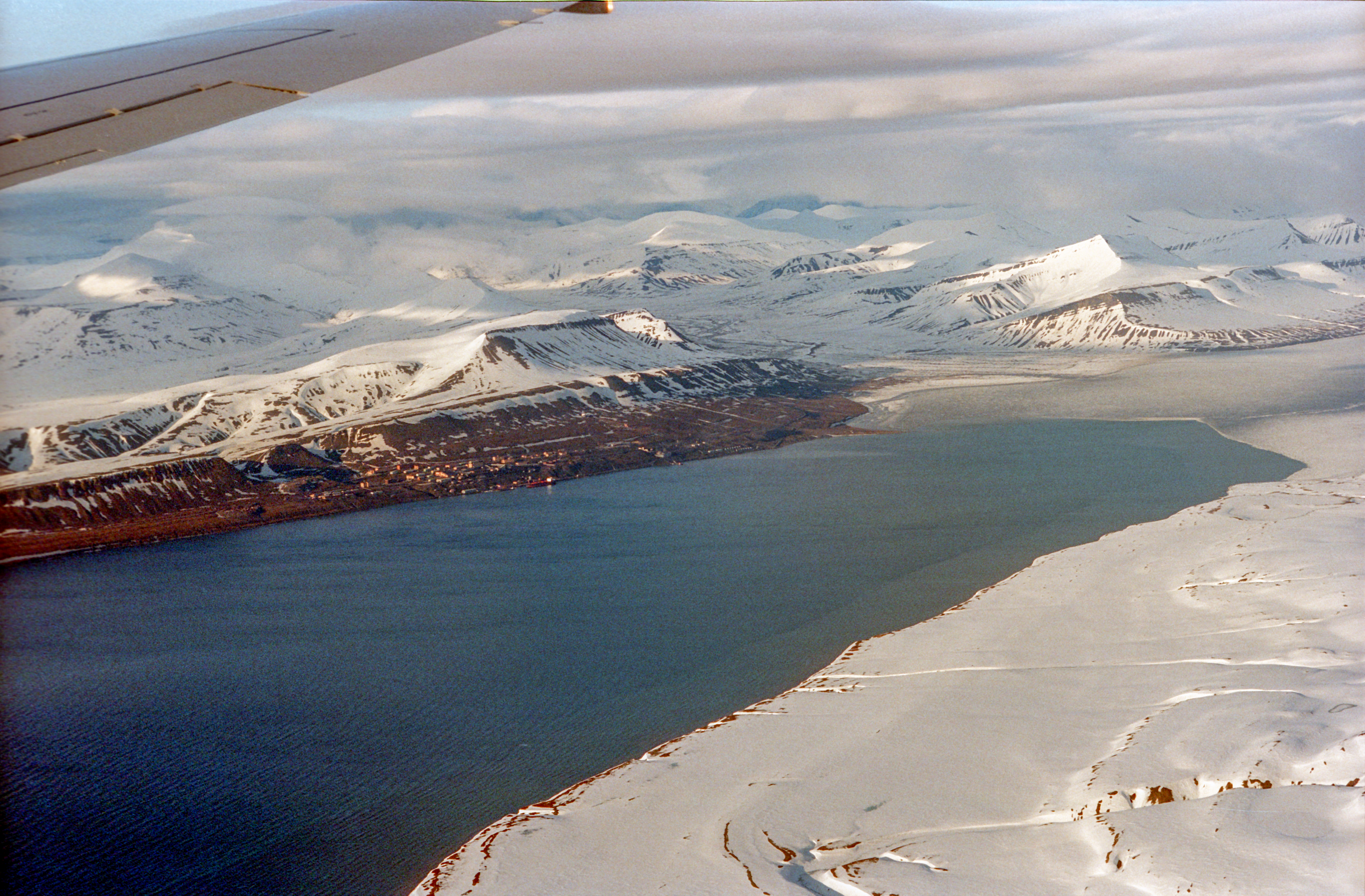 Svalbard, Barentsburg, Gronfjorden